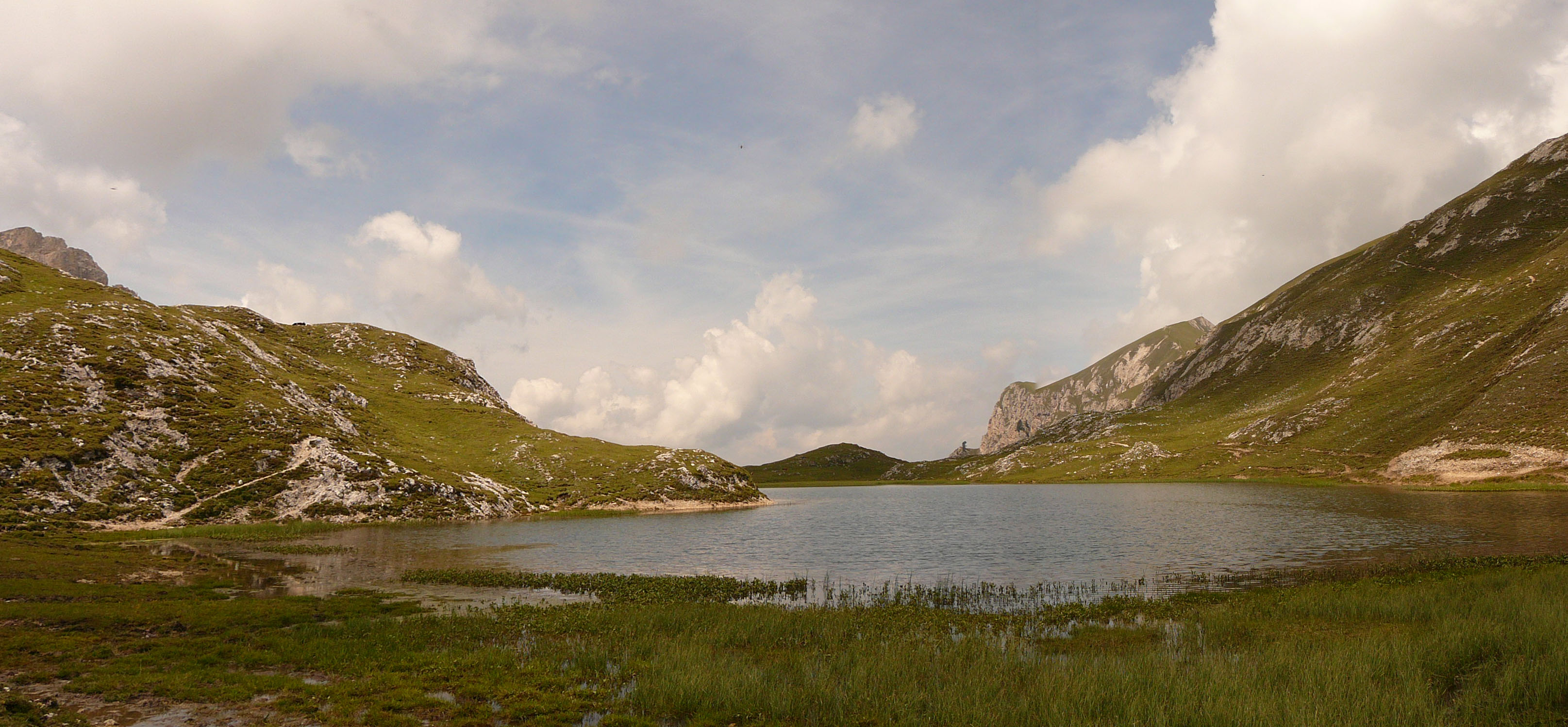 lagofojedora